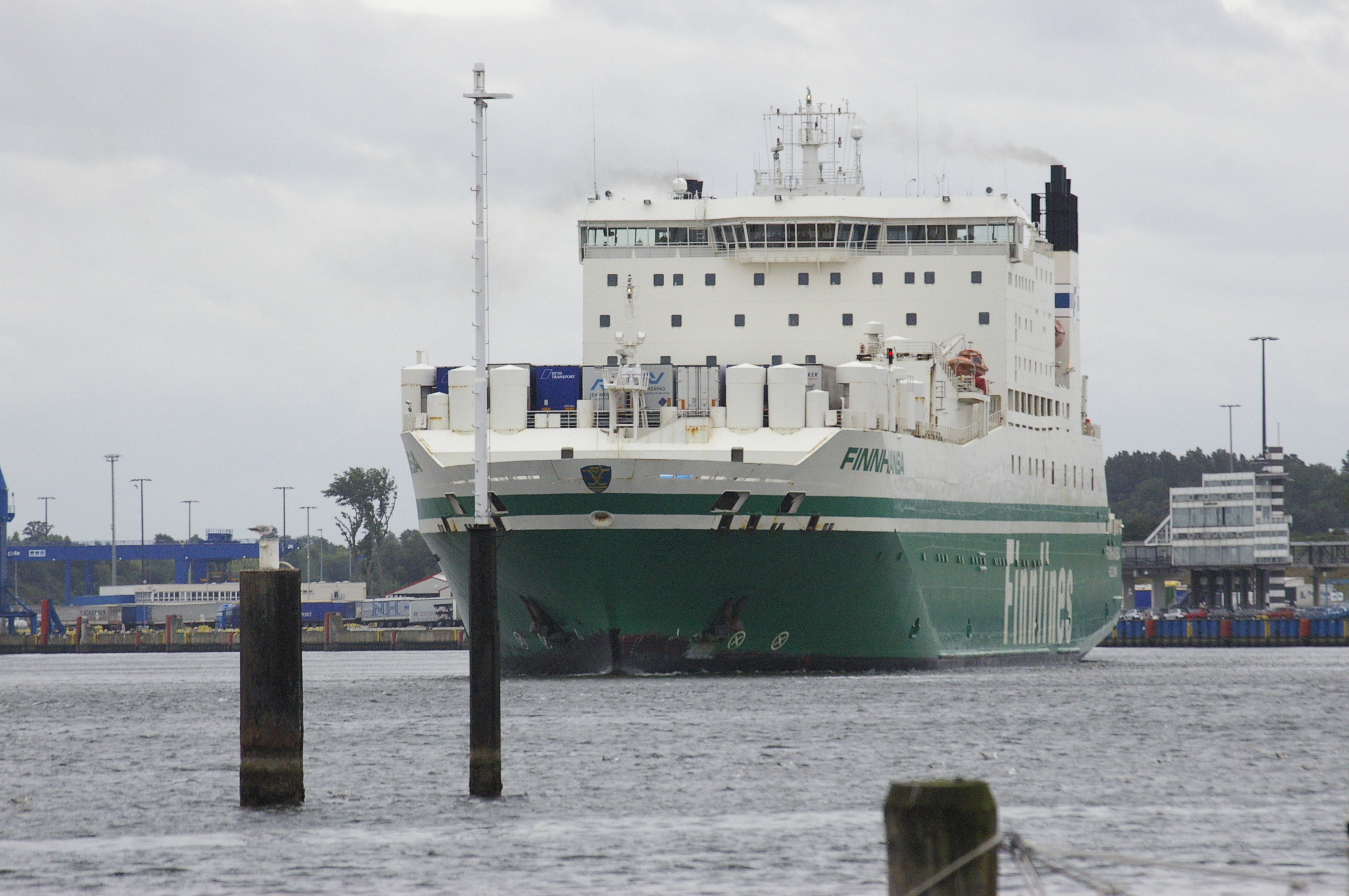 M/S Finnhansa in Travemuende